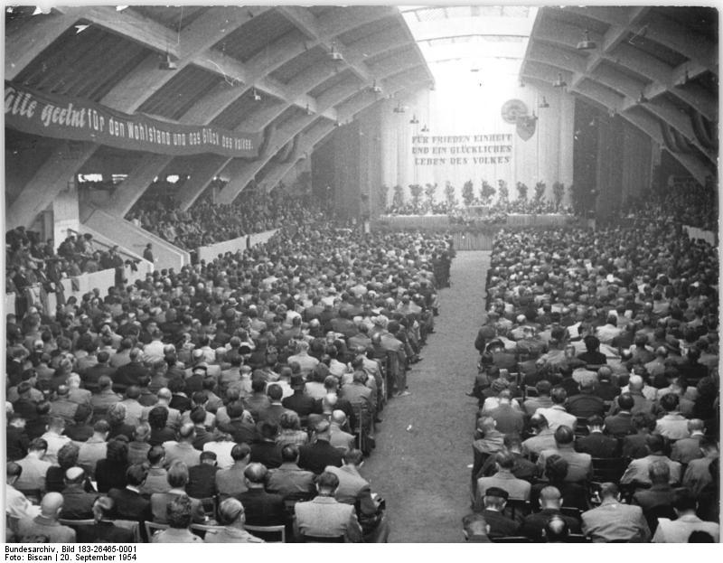 Zentralbild-Biscan Zi-Qu 20.9.1954 Konferenz der Wählervertretungen für den Bezirk Magdeburg In der Konferenz der Wählervertretungen für den Bezirk Magdeburg stellten sich am 19.9.1954 in der "Hermann Giessler"-Sporthalle in Magdeburg die Spitzenkandidaten der Natonalen Front für den Bezirk vor. UBz Während der Konferenz."